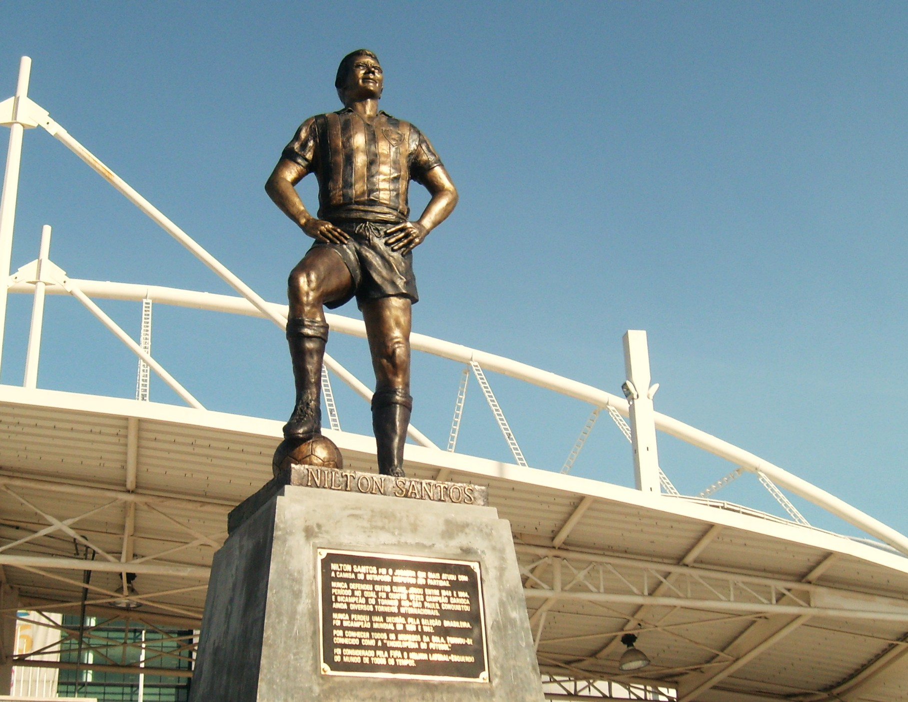 Estátua de Nílton Santos, localizada à ala oeste do Estádio Olímpico João Havelange.